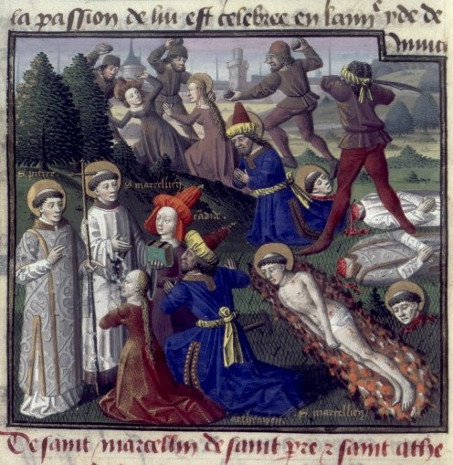 Maeryrium der Hl. Marcellinus und Petrus